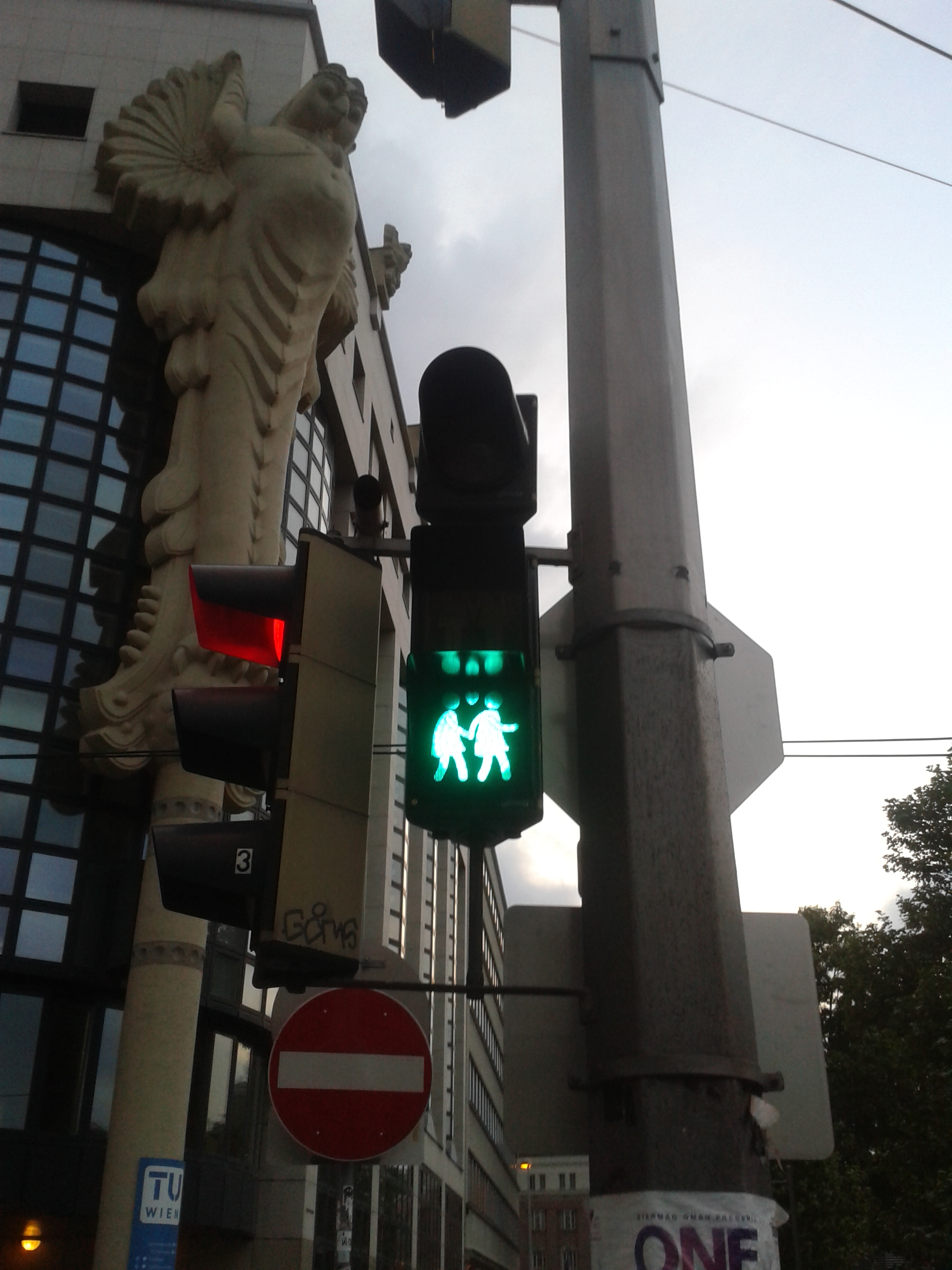 Zwei homosexuelle Ampelfrauen im Rahmen des ESC 2015 in Wien Wiedner Hauptstraße/karlsplatz